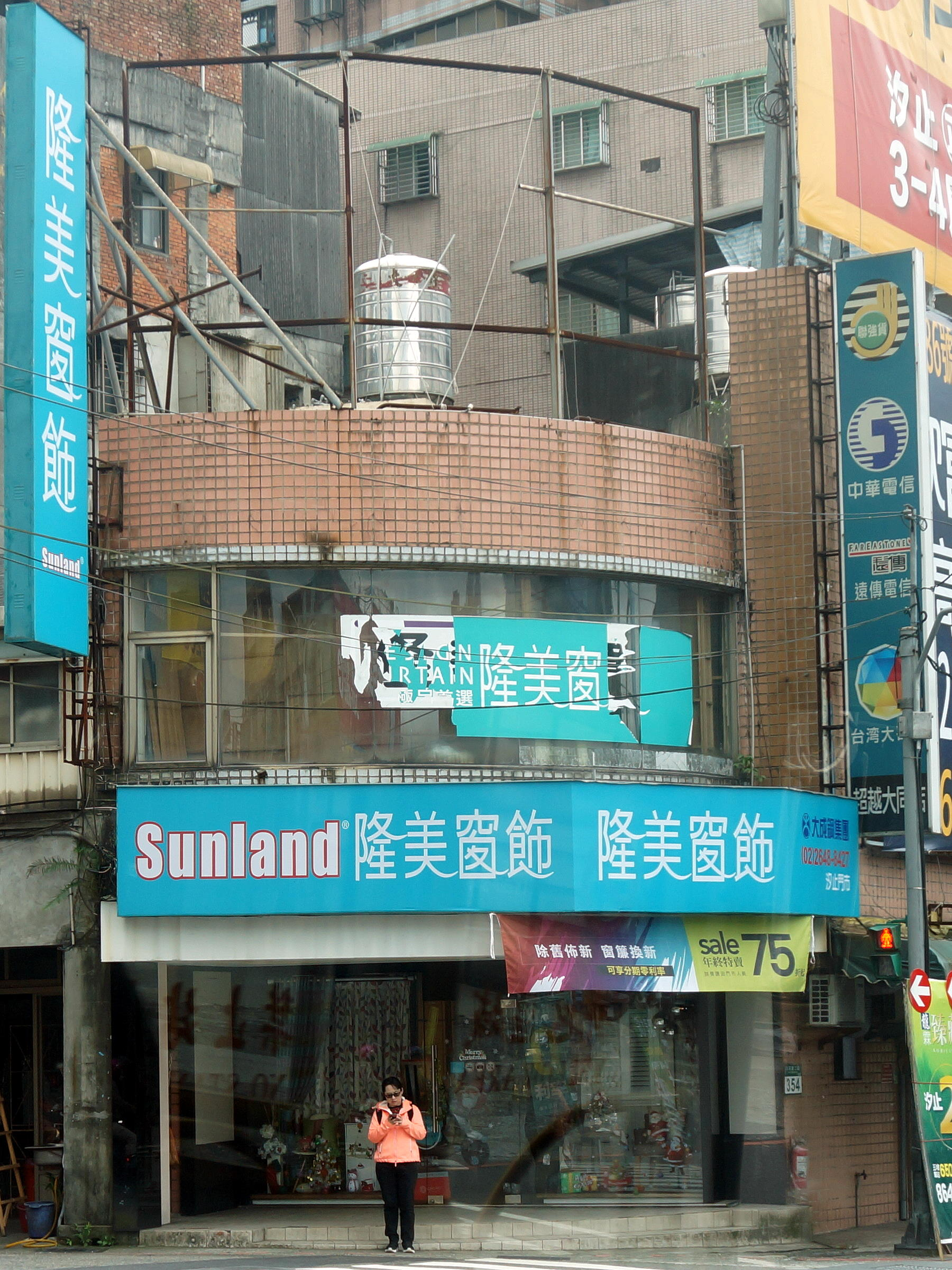 隆美窗飾汐止門市，地址：新北市汐止區水源路一段2號。本照片係從對面公車上拍攝。